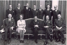 Ministerie van Algemene Zaken in 1971